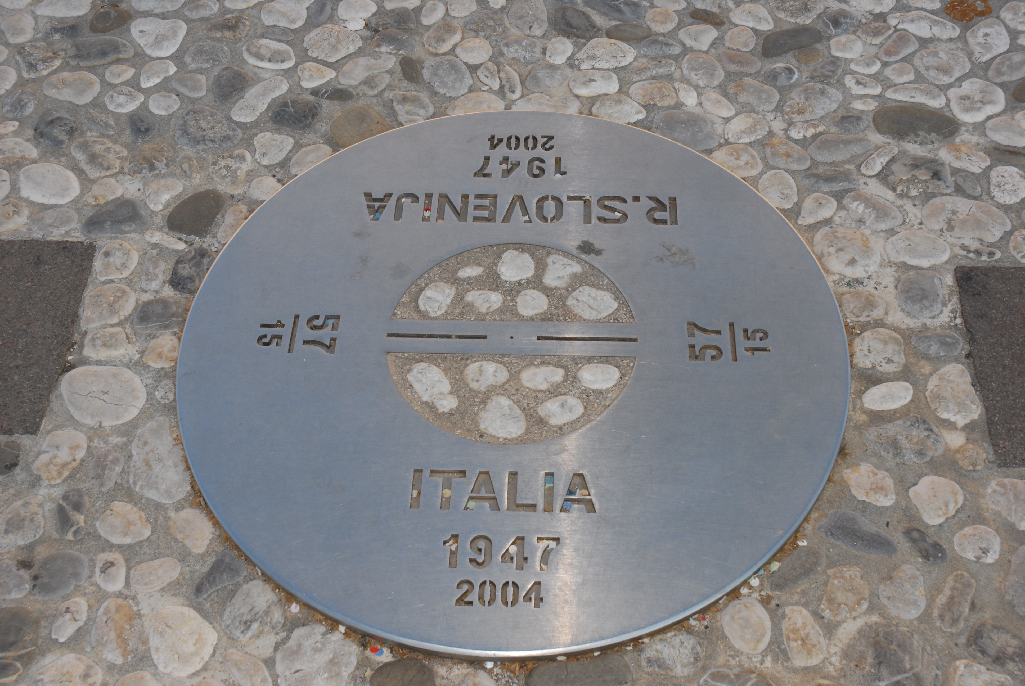 Confine a piazza della Transalpina / State border at Transalpina square